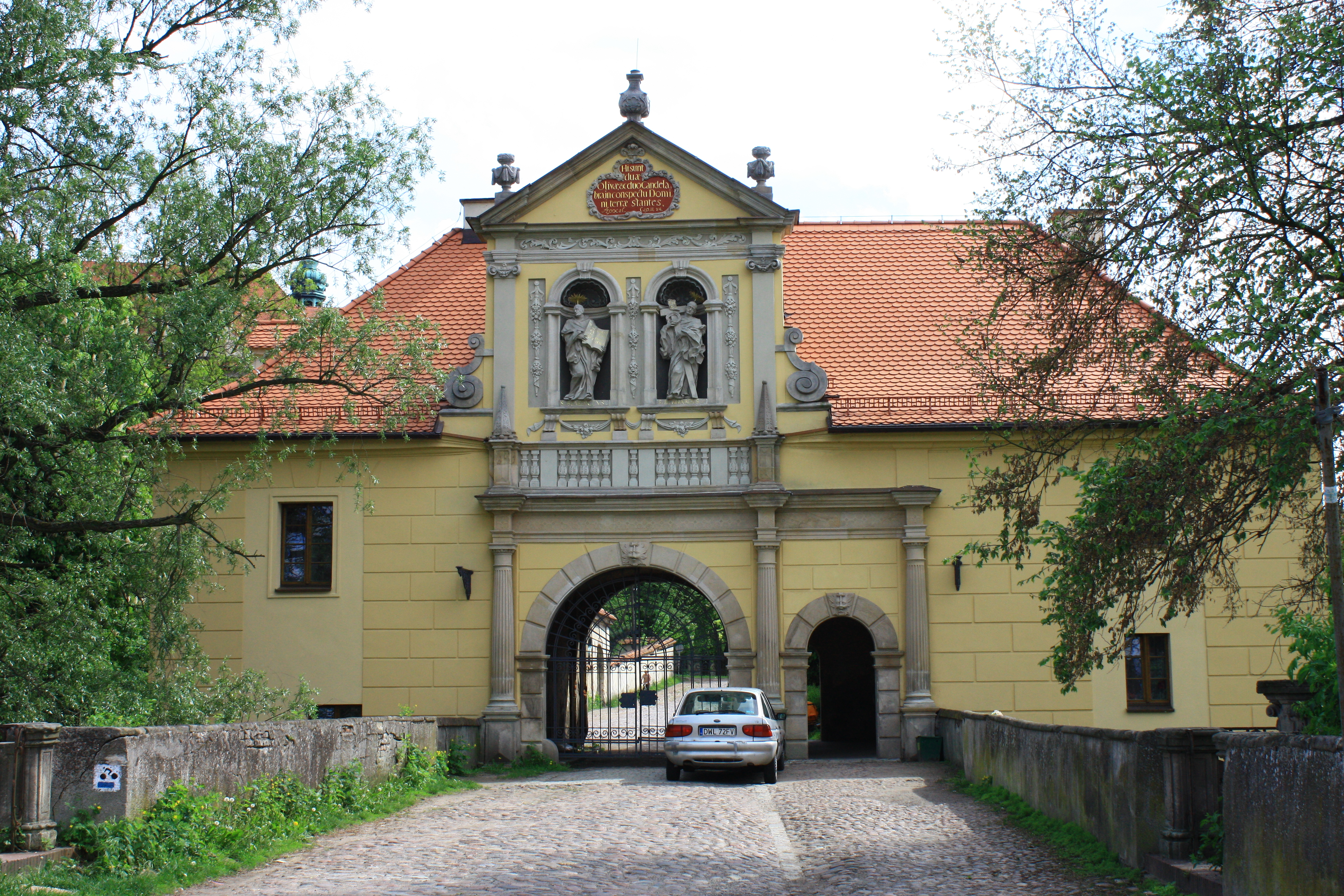 Lubiąż, budynek bramy wjazdowej, ok. 1710